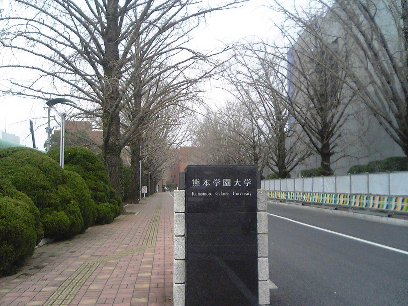 熊本学園大学